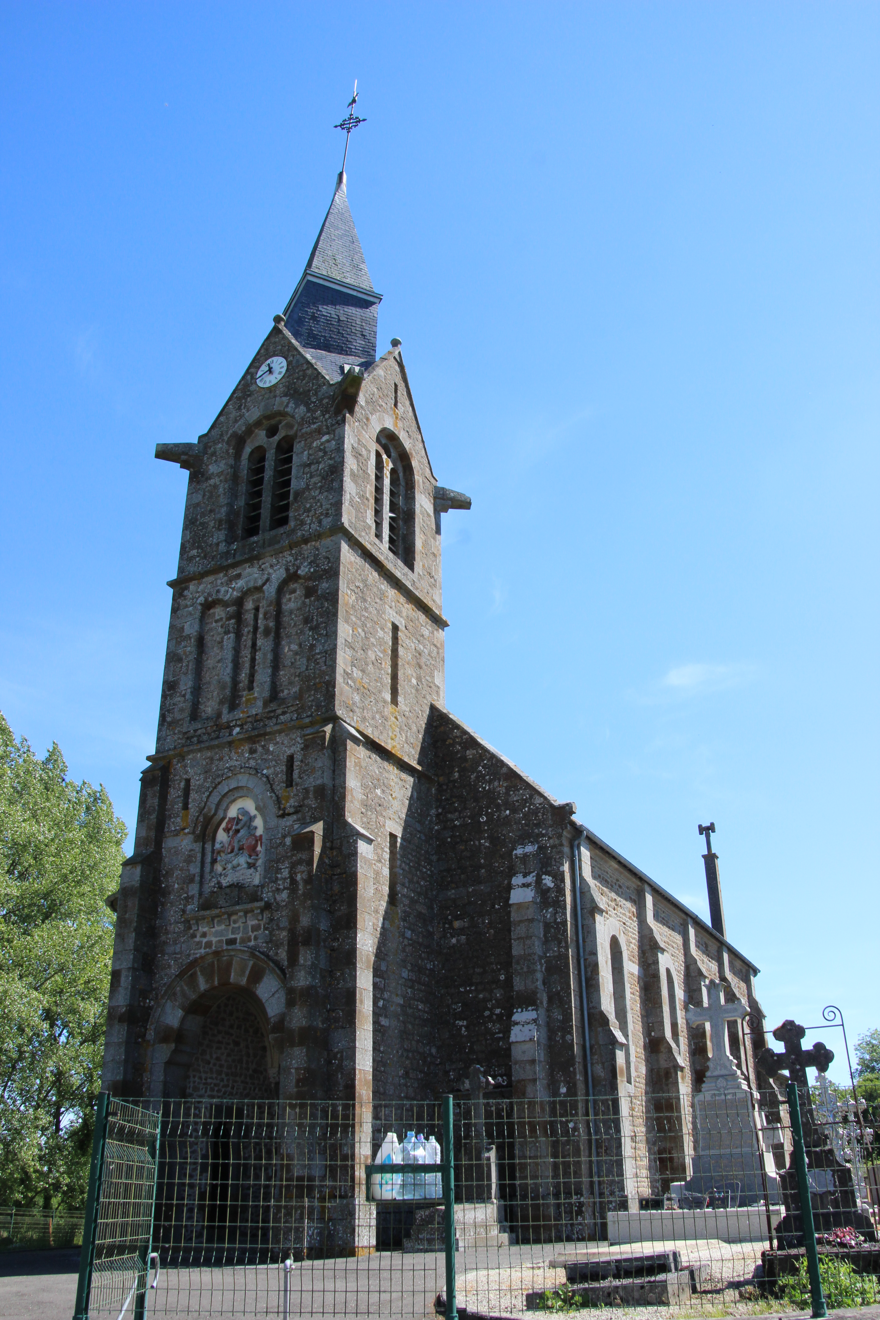 église Saint-Georges-d'Annebecq